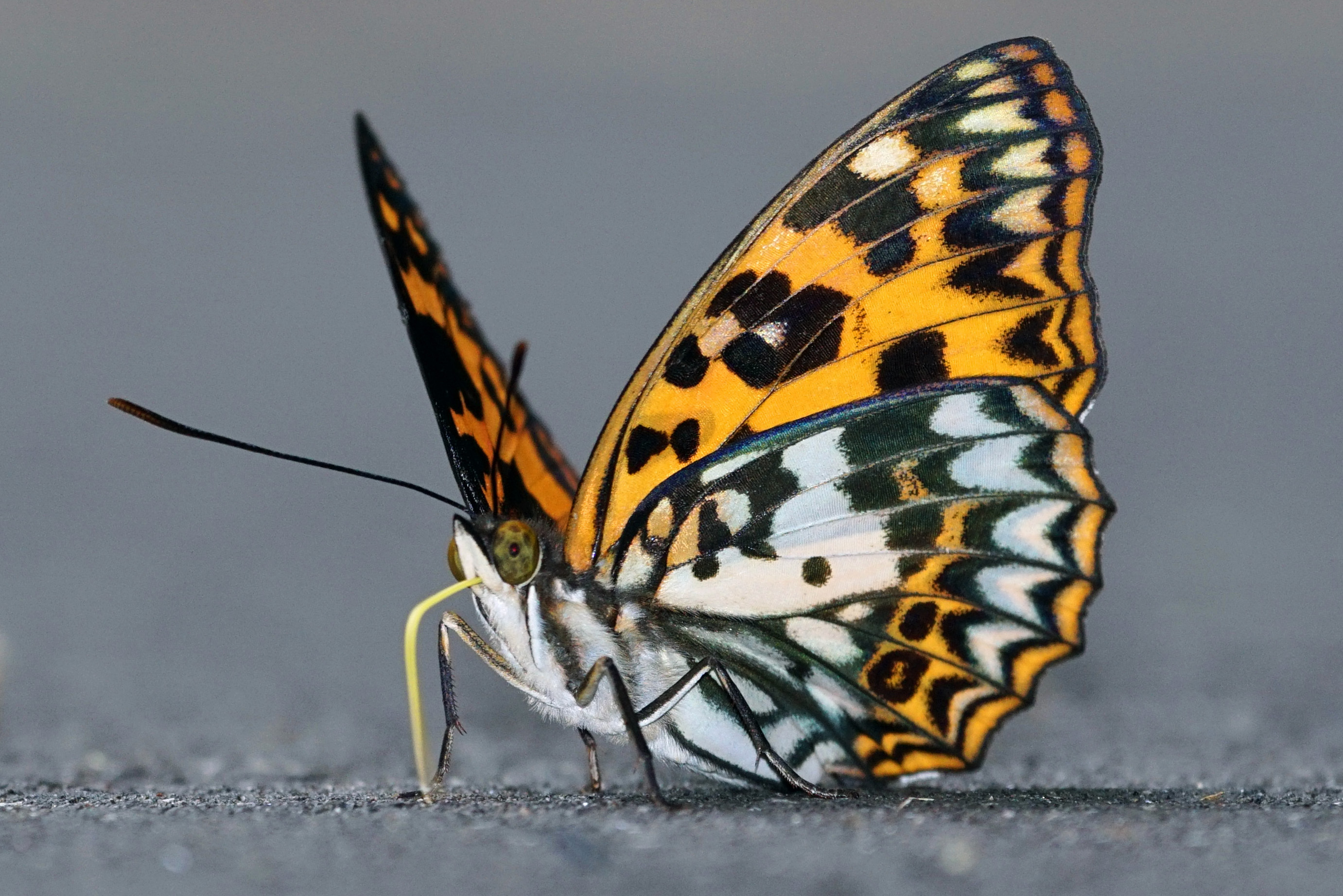 台灣燦蛺蝶 Sephisa daimio 雄